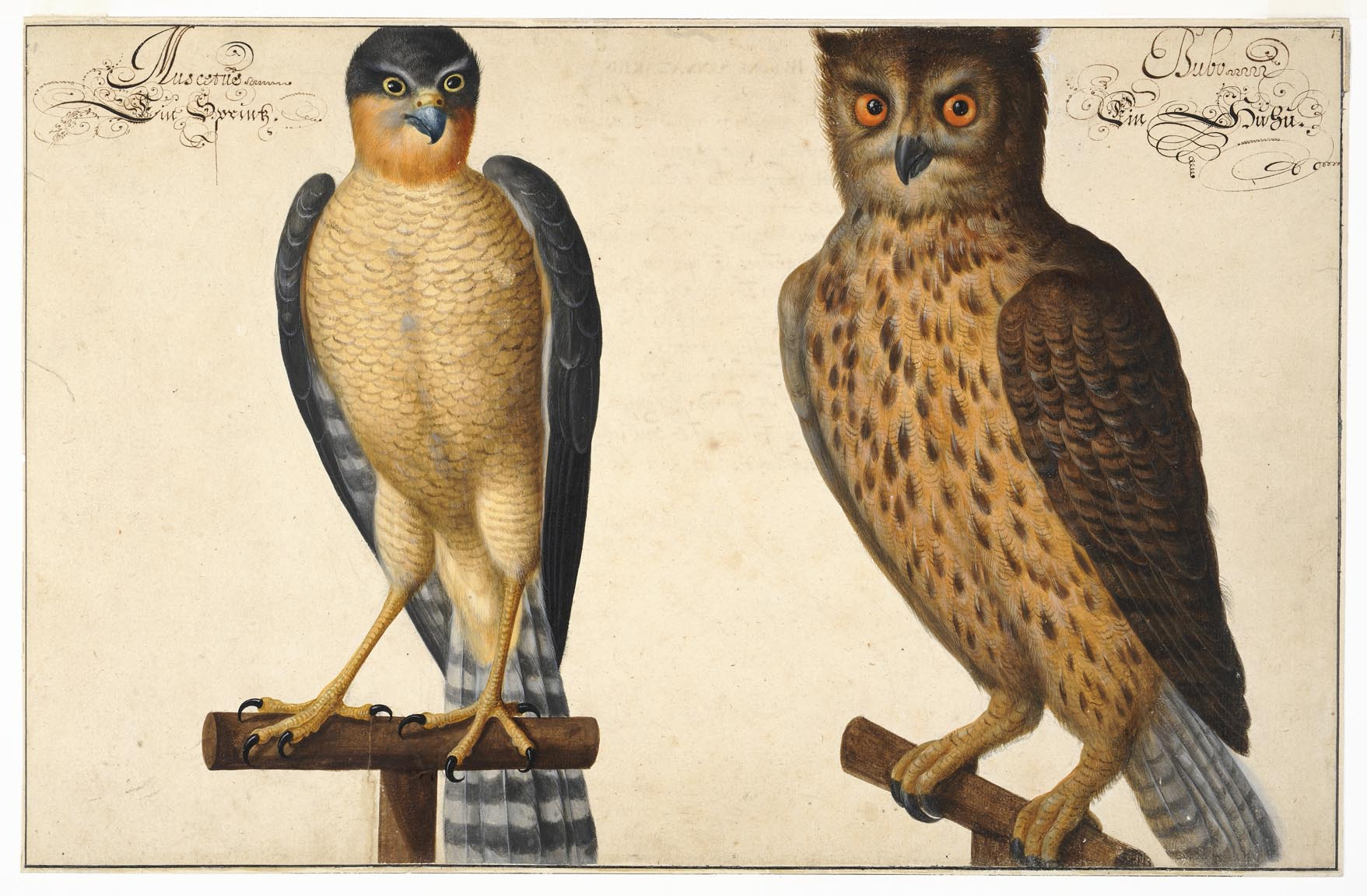 Johann Walter, Hibou et Crécelle, aquarelle et gouache sur papier, milieu du XVIIe siècle.